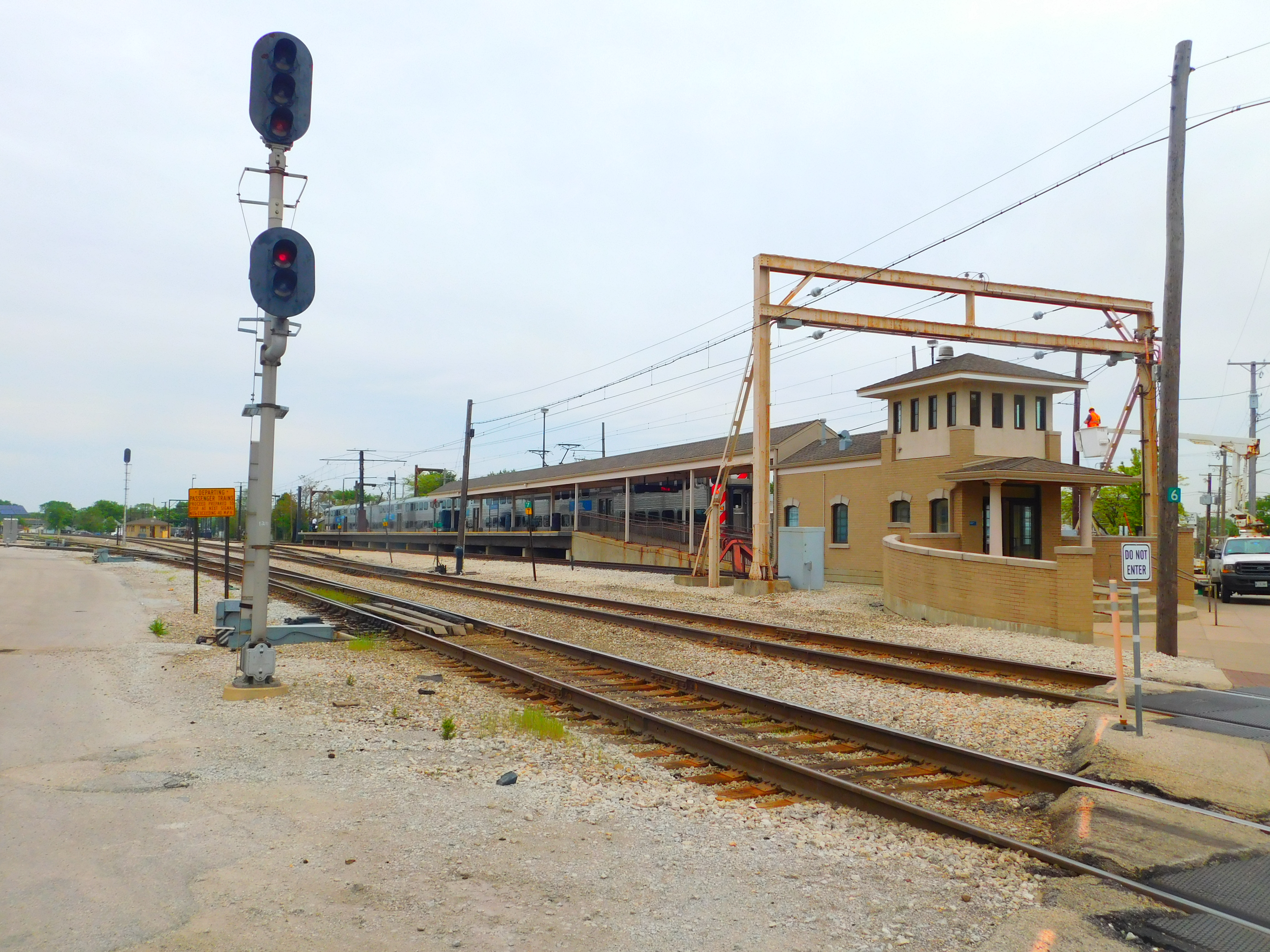 Blue Island, Illinois